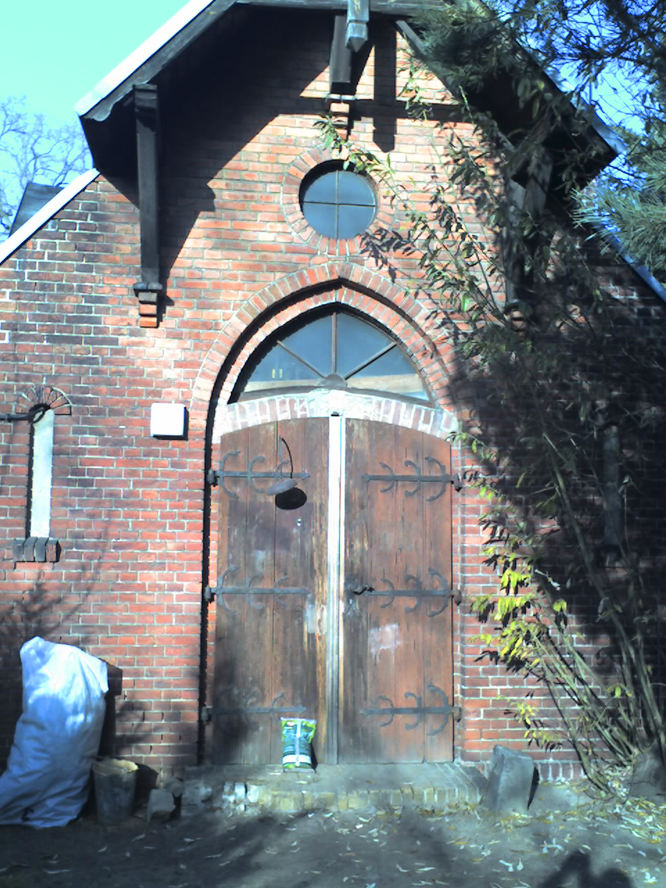 Gartenrabeiterhaus auf dem Friedhof Pankow V vormals die Leichenhalle in Schönholz